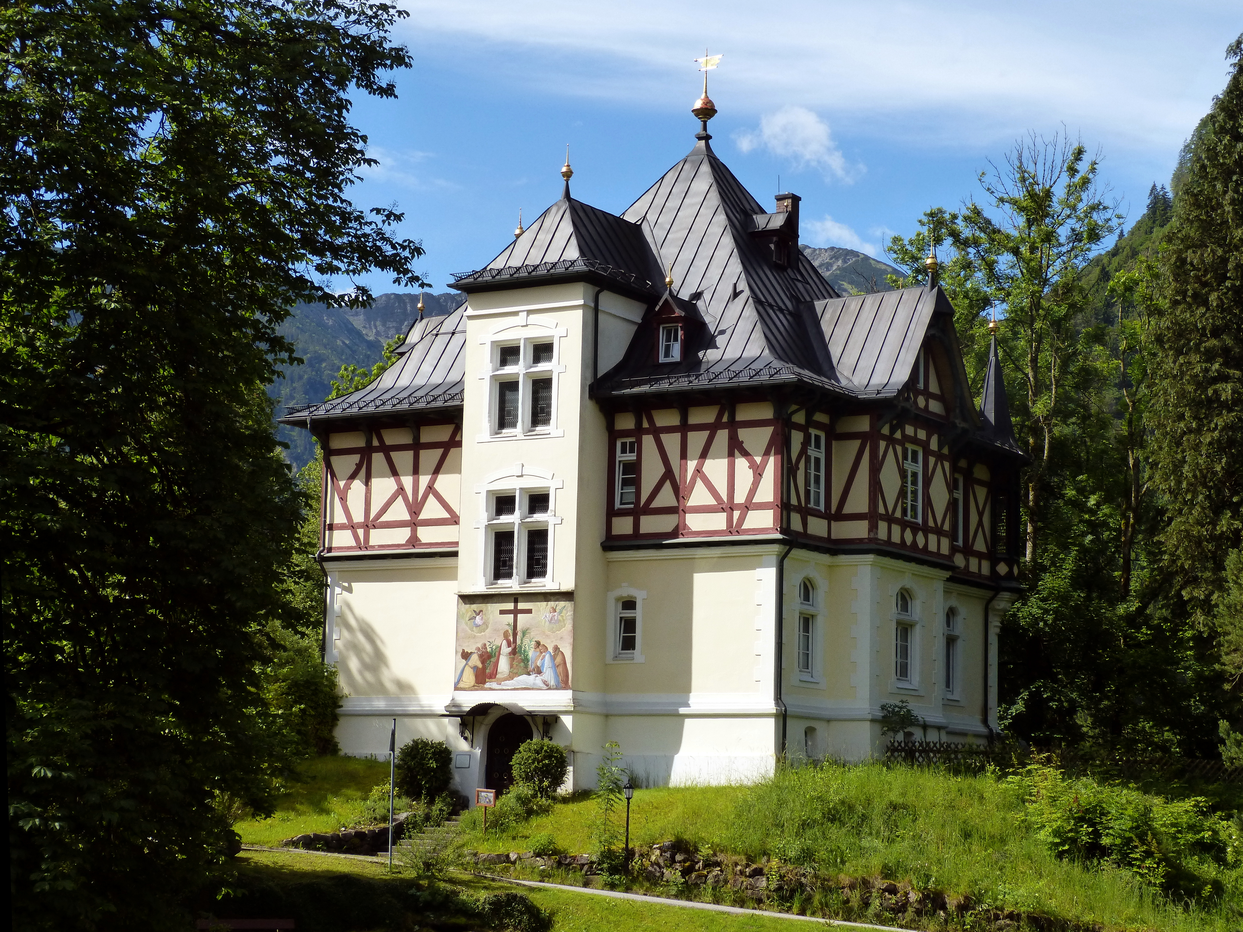 Oberammergau, Ettaler Straße 45. Das Hillern-Schlössl, ein reich gegliederter Walmdachbau in Heimatstilformen, wurde 1886 im Auftrag der Schriftstellerin Wilhelmine von Hillern erbaut.